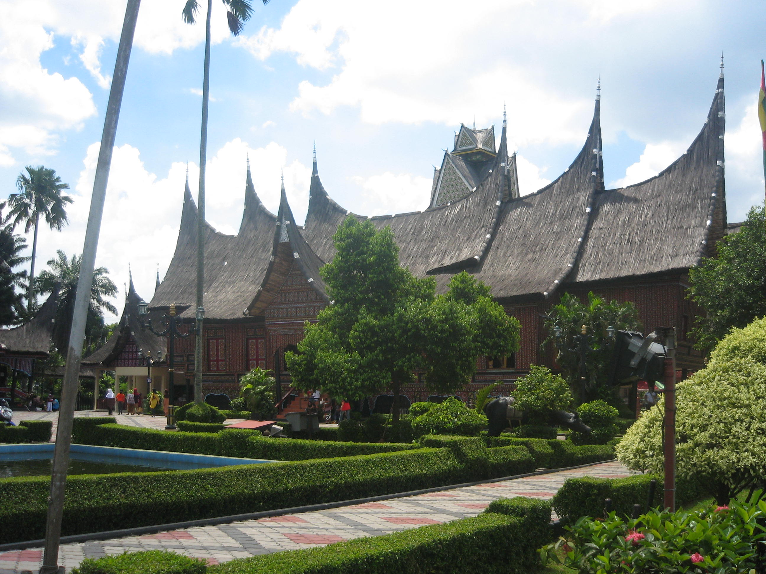 Rumah Adat Minang Kabau Di TMII